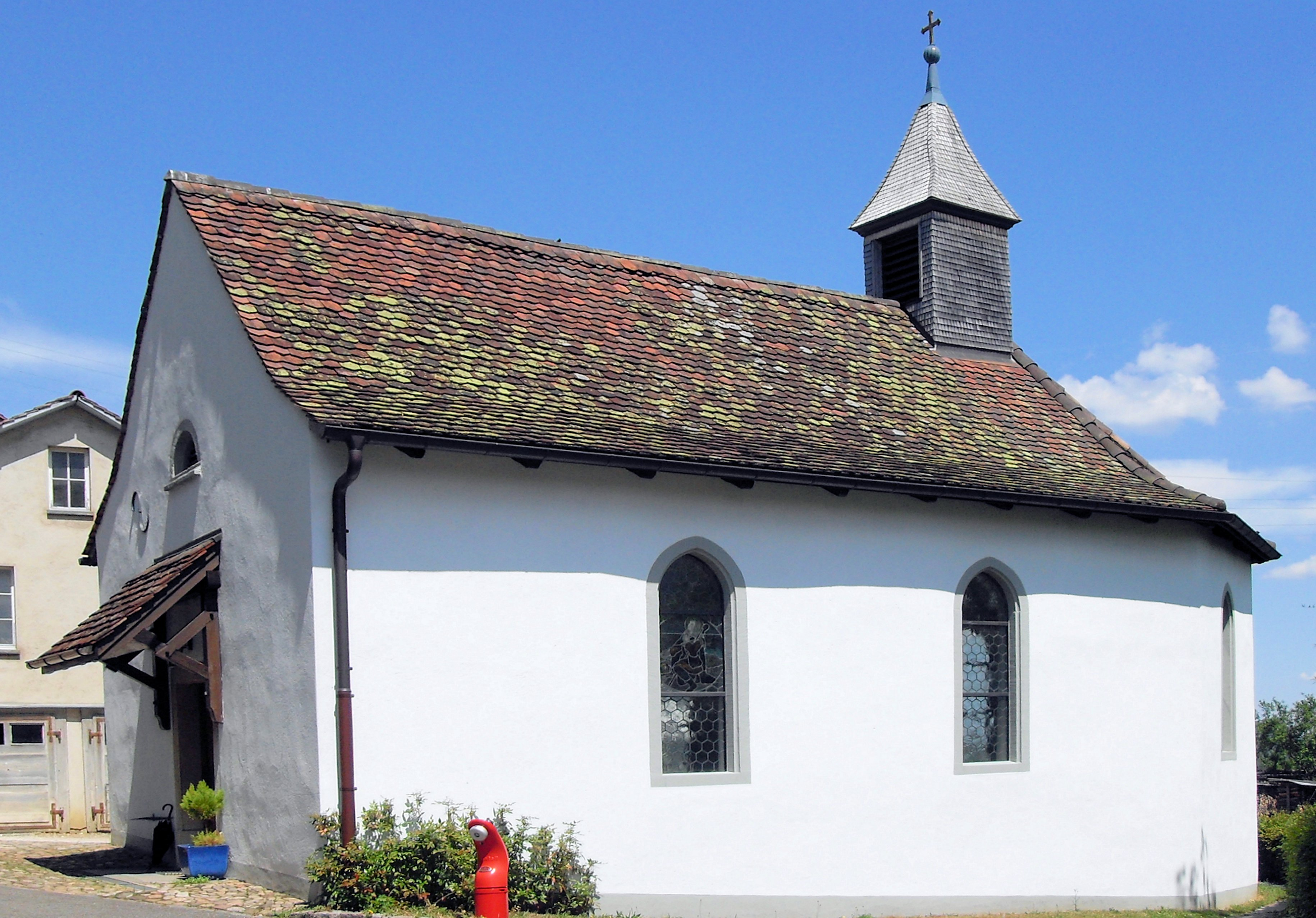 Kapelle St. Wendelin in Nuglar, Gemeinde Nuglar-St. Pantaleon, Kanton Solothurn, Schweiz